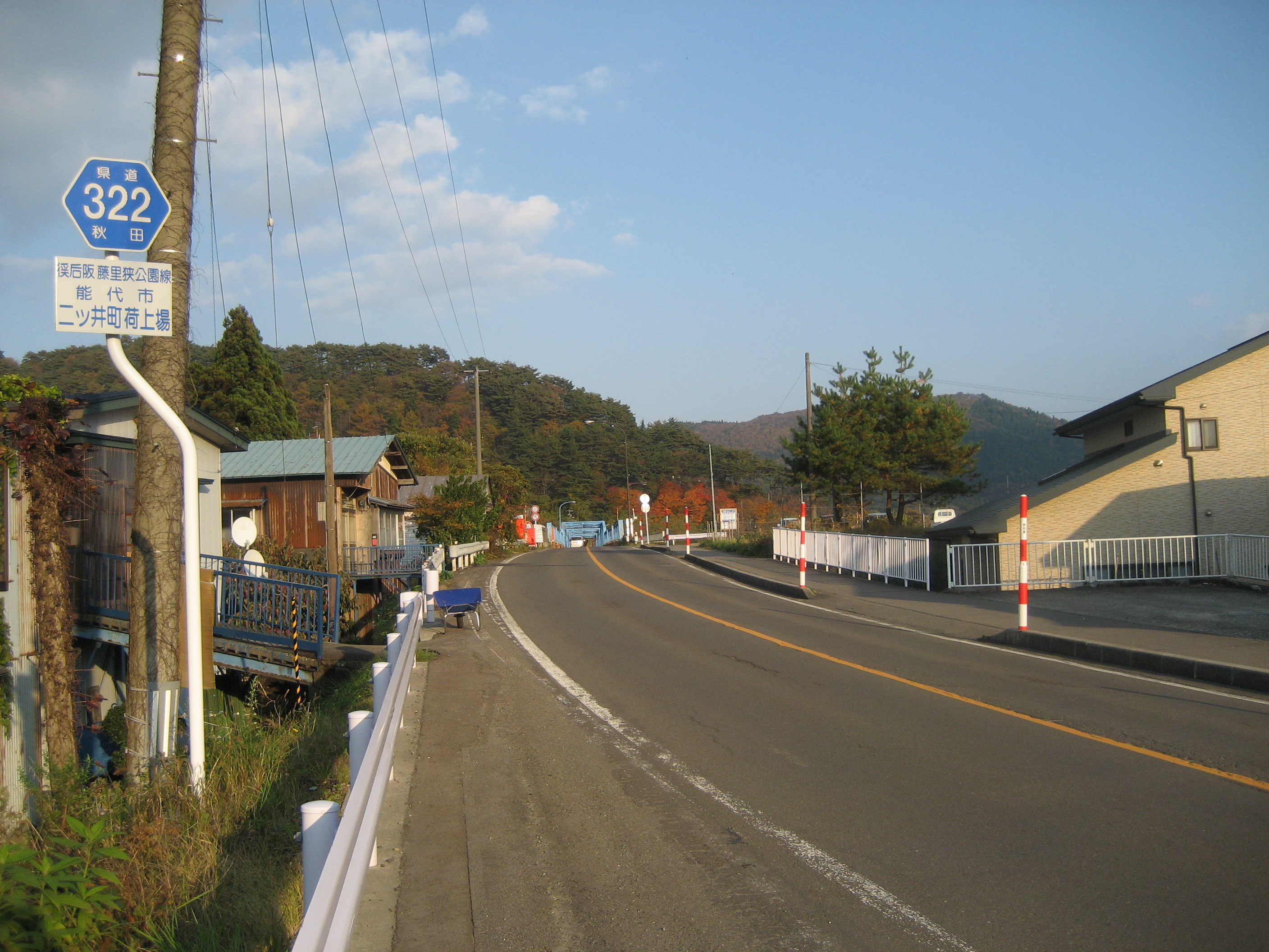 秋田県道322号線能代市二ツ井町荷上場付近